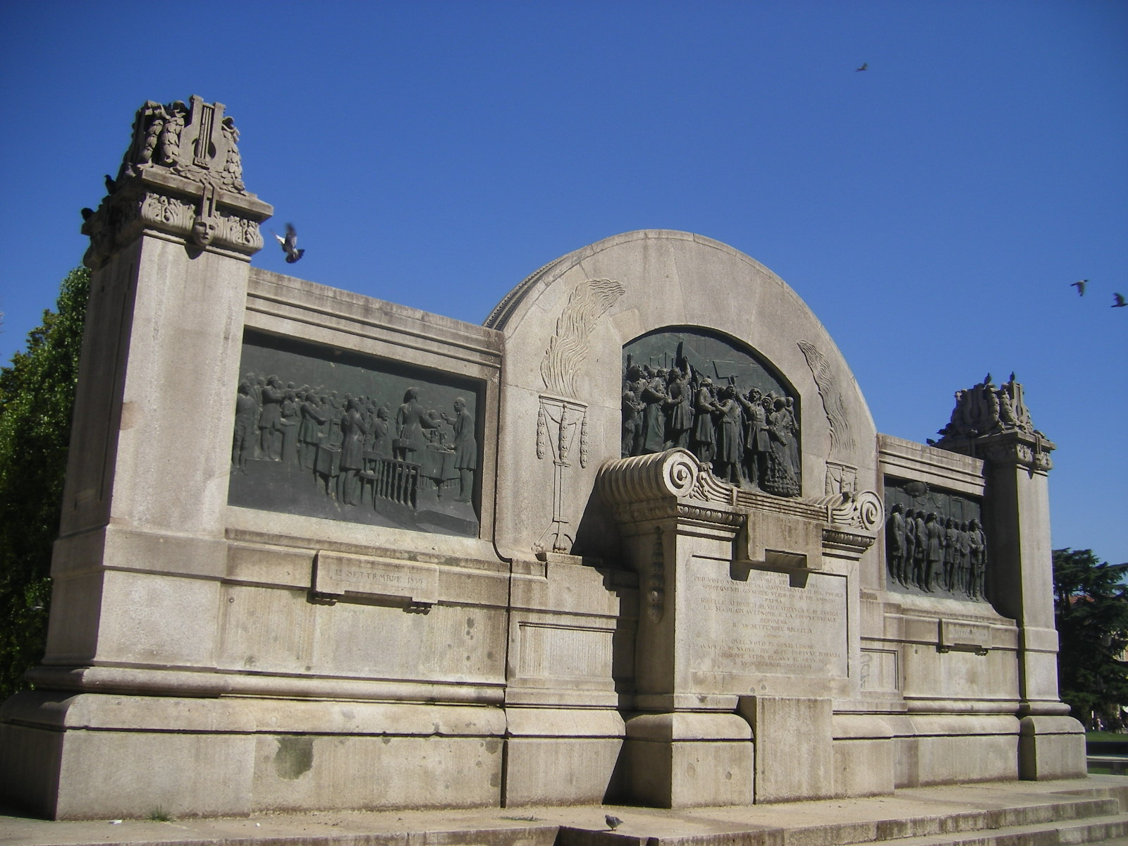 Parma